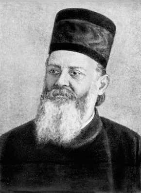 Викентий (Вуич), еп. Банатский. Фотография. 30-е гг. XX в.